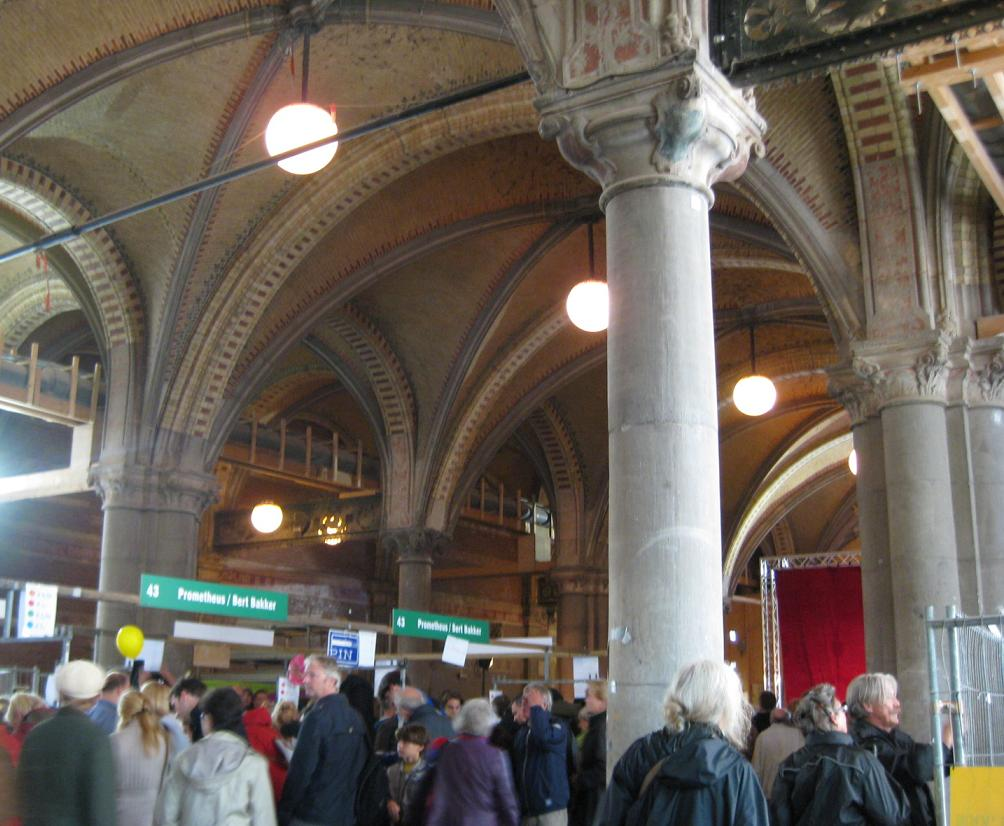 Boekenmarkt in de Passage onder het Rijksmuseum tijdens de Uitmarkt 2011 in Amsterdam